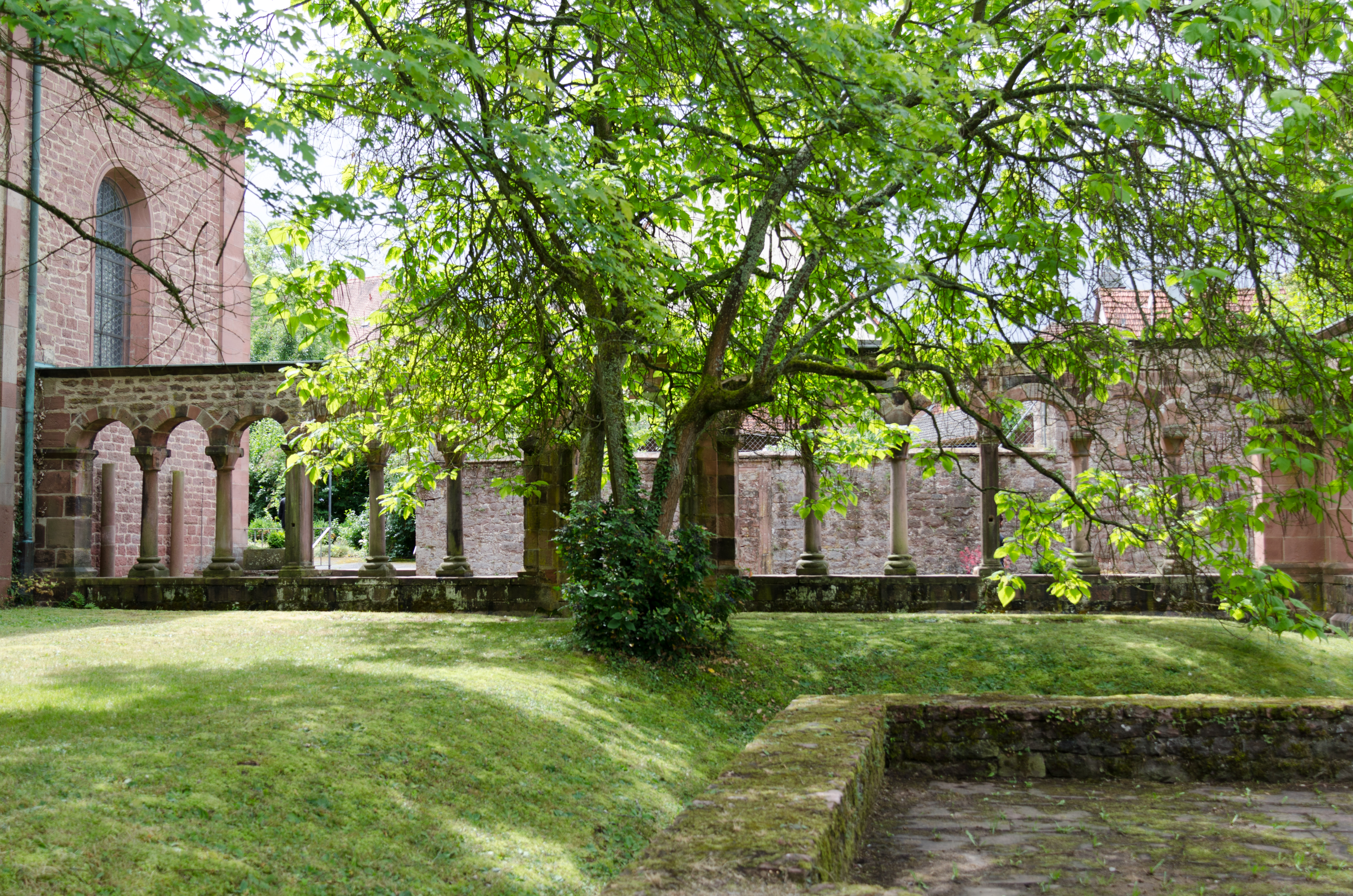 Neustadt am Main, Kreuzgang